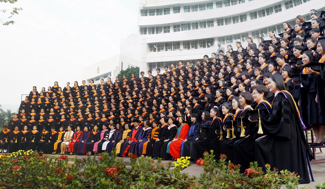 ภาพบัณฑิต พยาบาล มช